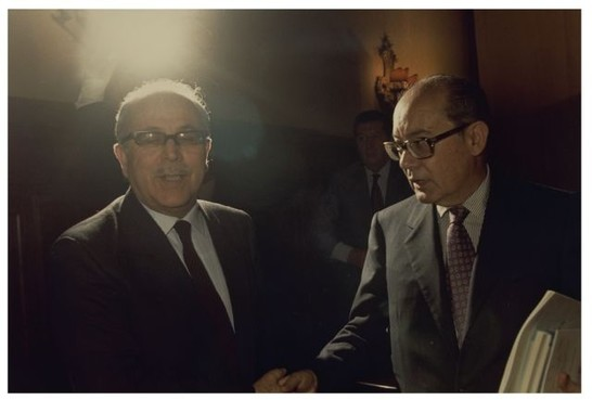 Il Vicepresidente Aldo Aniasi, Flaminio Piccoli e Franco Malfatti incontrano una delegazione marocchina